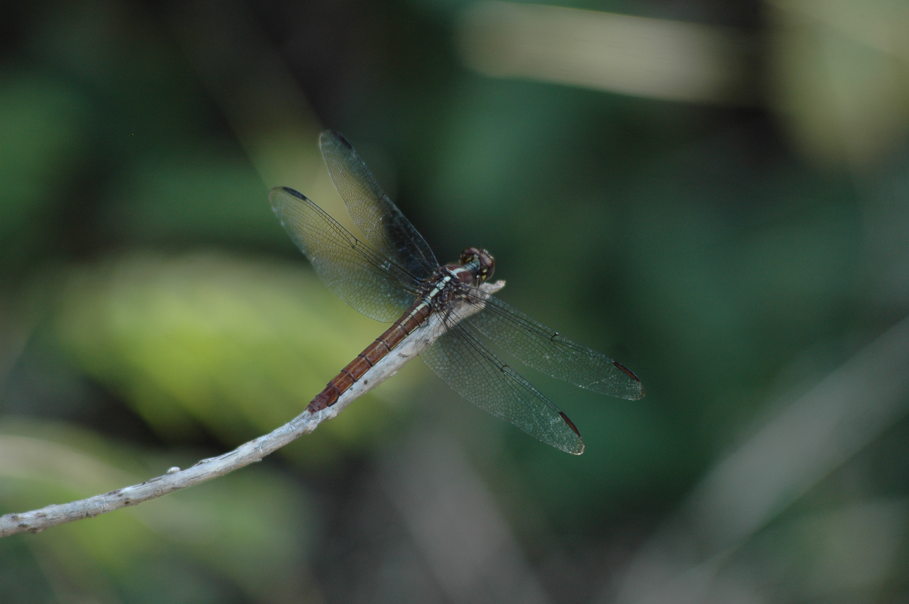 Libellule des Antilles